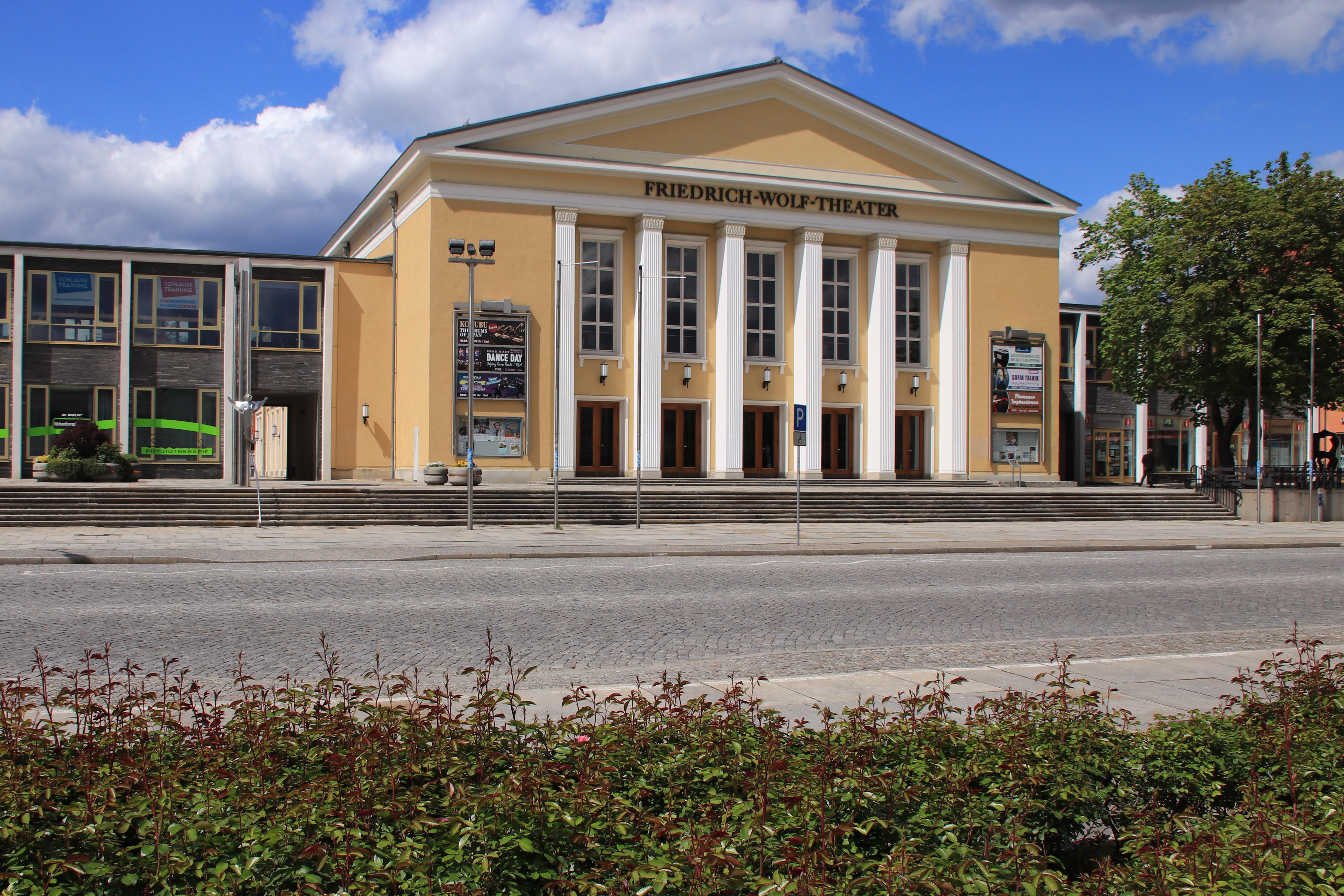 Eisenhüttenstadt, Friedrich-Wolf-Theater in der Lindenallee